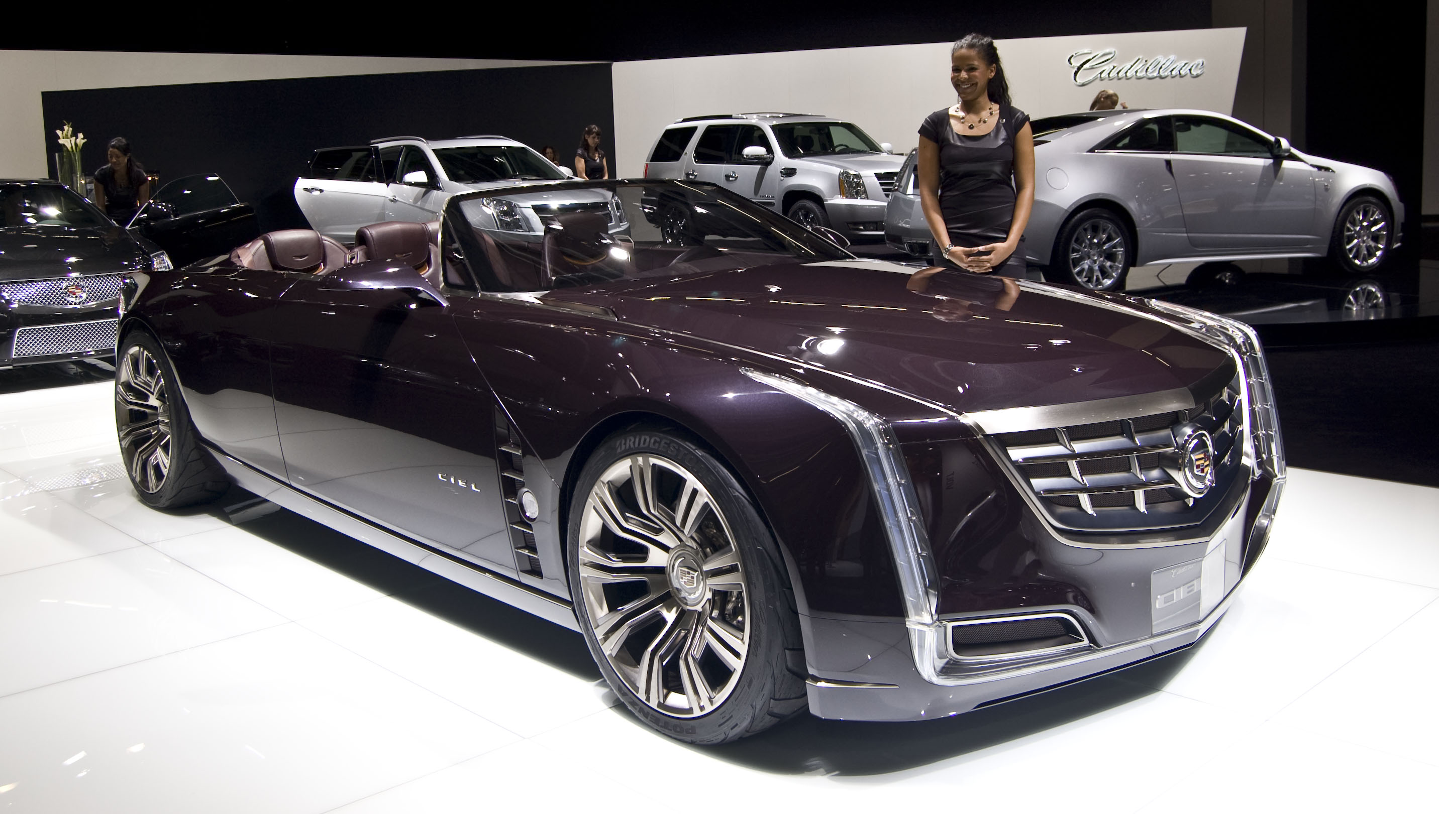 Cadillac Ciel Concept en el Salón de Frankfurt 2011. Análisis en Diariomotor